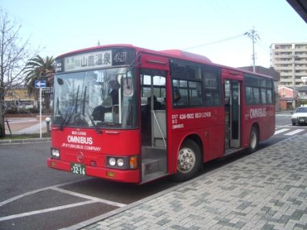 Jr山鹿線のバス